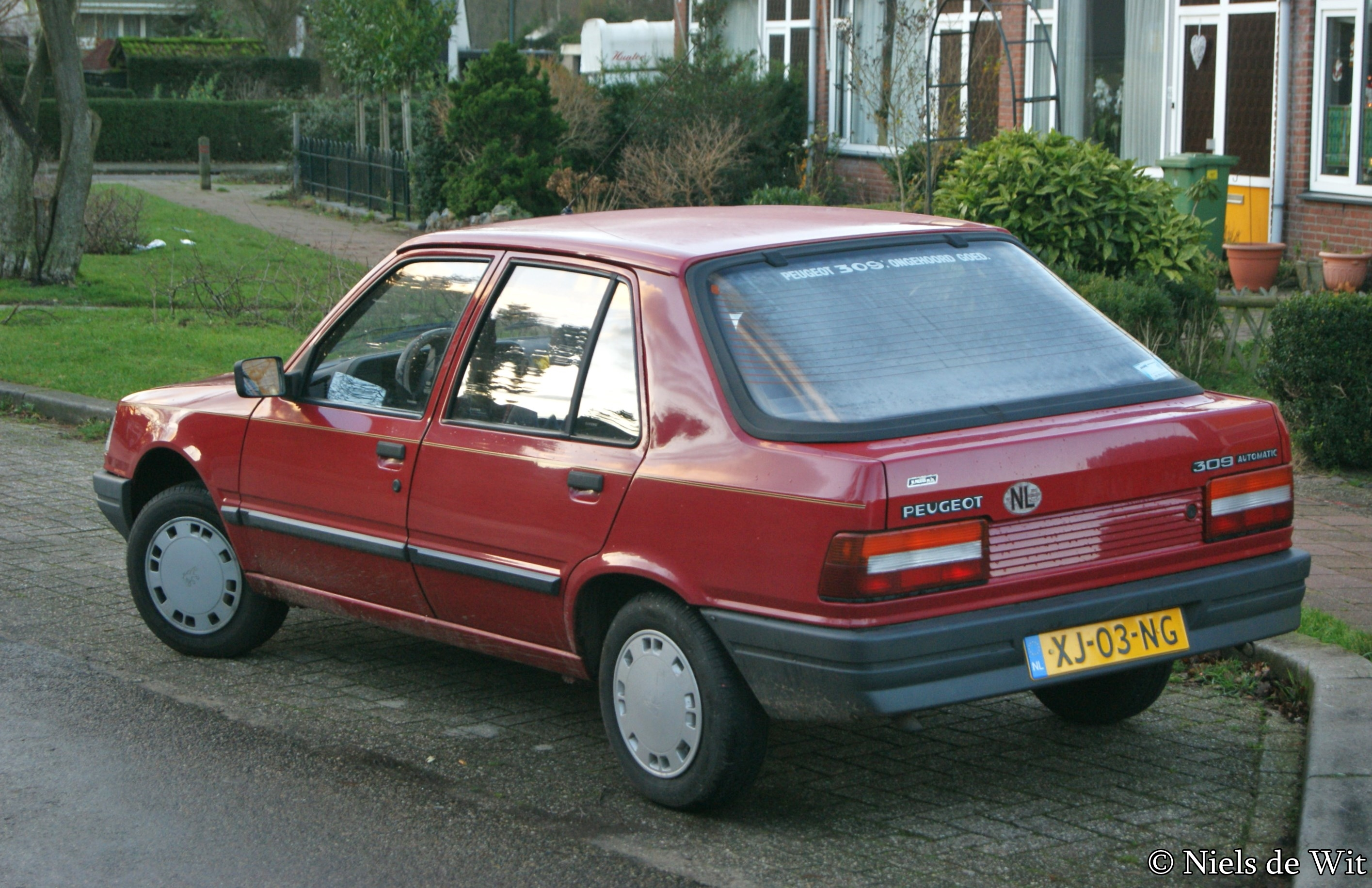 XJ-03-NG